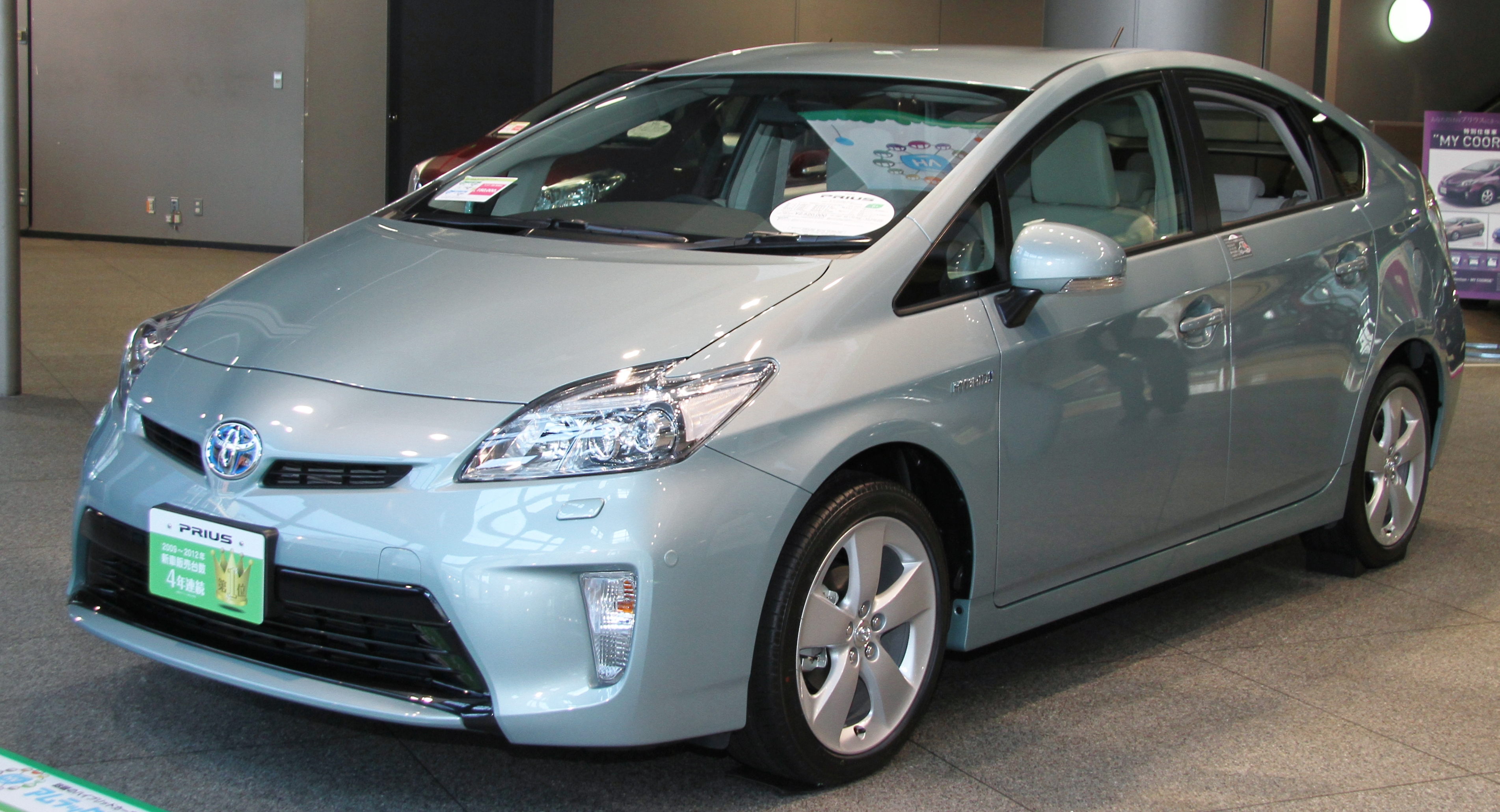 Toyota Prius